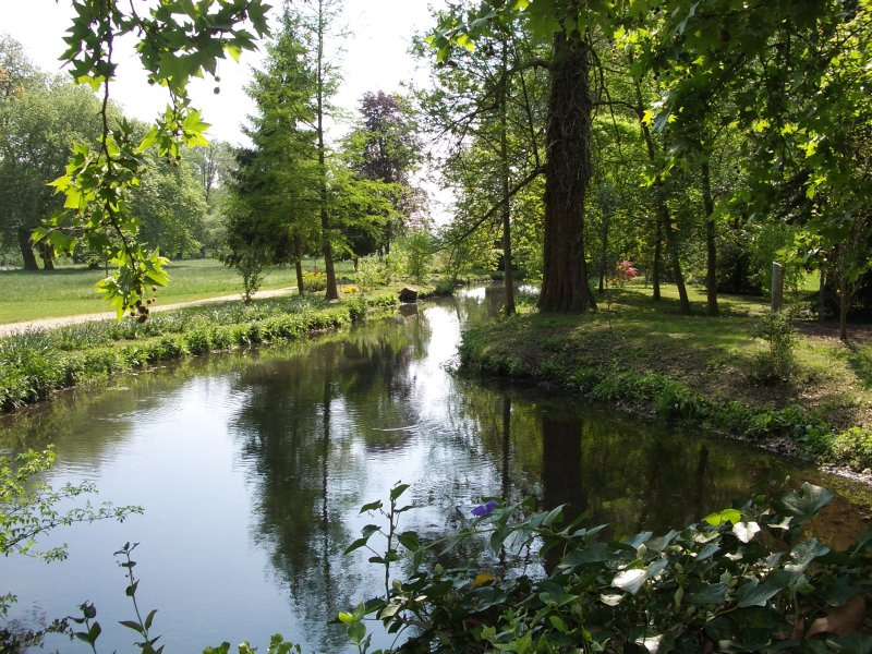 Le parc du château d'Acquigny